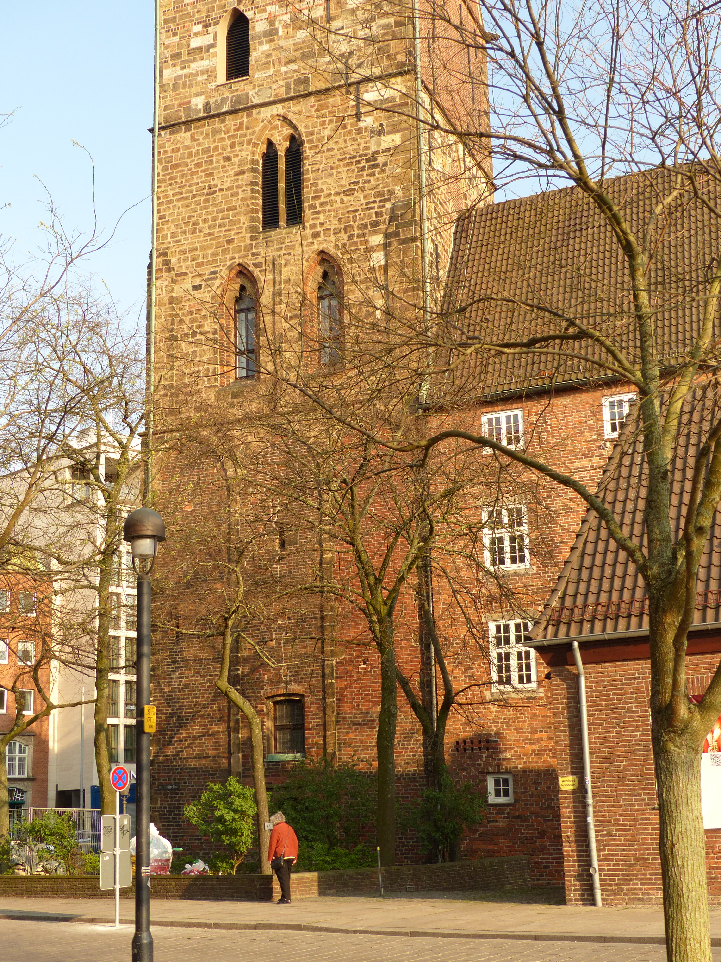 Martinikirche in der Bremer Altstadt. Die Westseite des Turms hat unten große sandsteingefasste Spitzbogenblenden, darüber Sandsteinverblendung